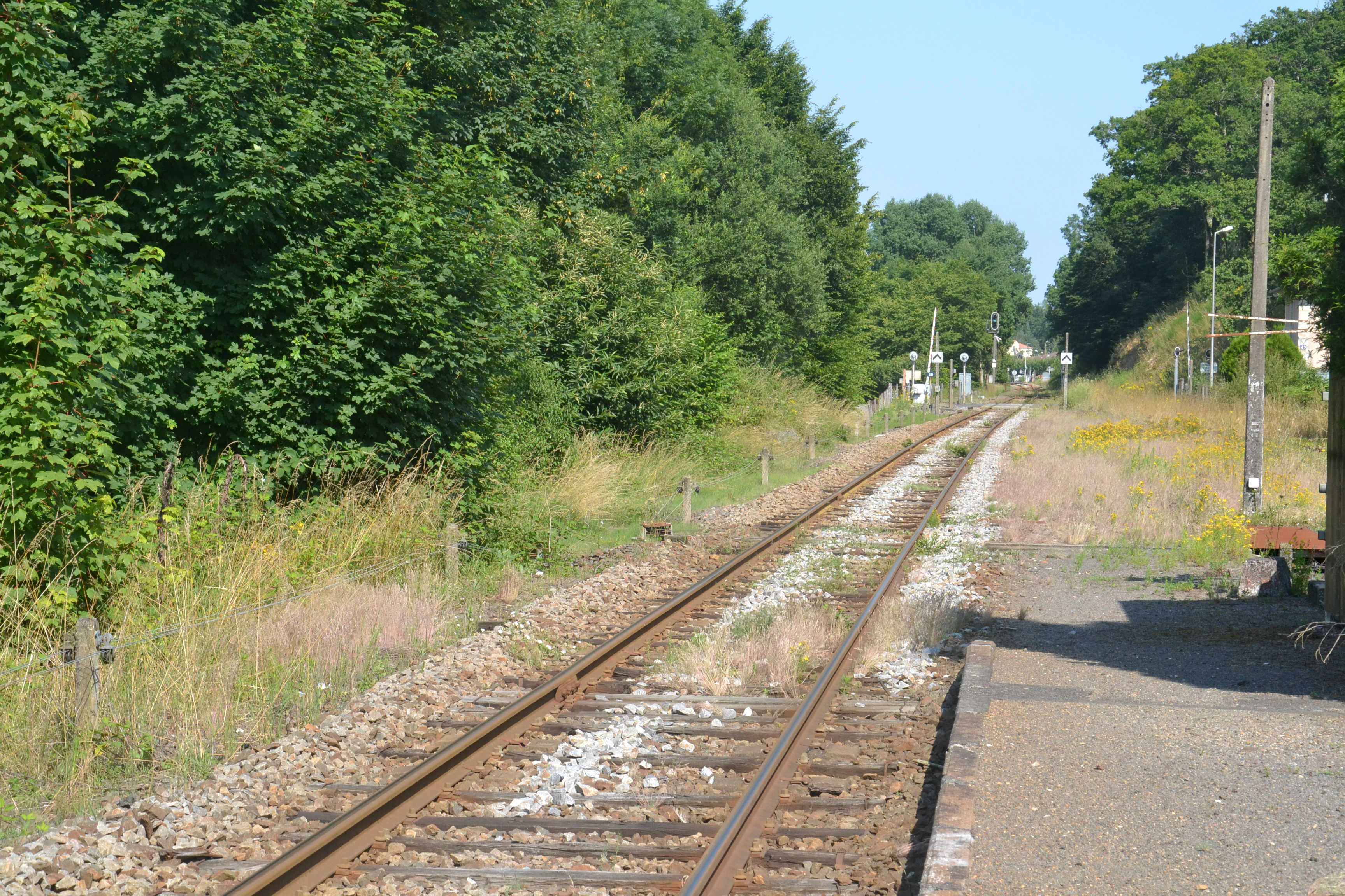 La ligne ferroviaire de Limoges à Angoulême, en gare d'Exideuil (Charente, France)